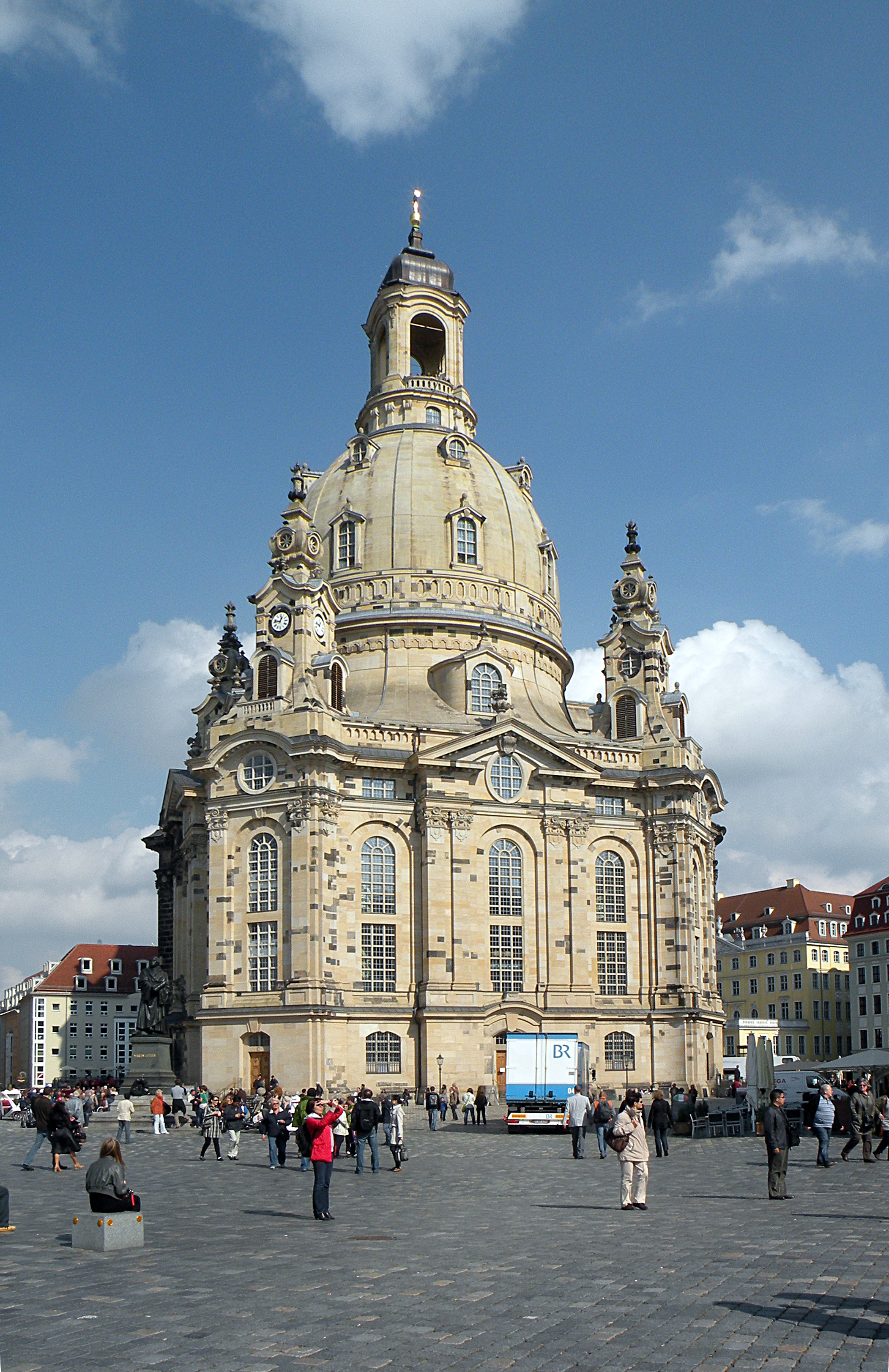 Frauenkirche (Dresden).